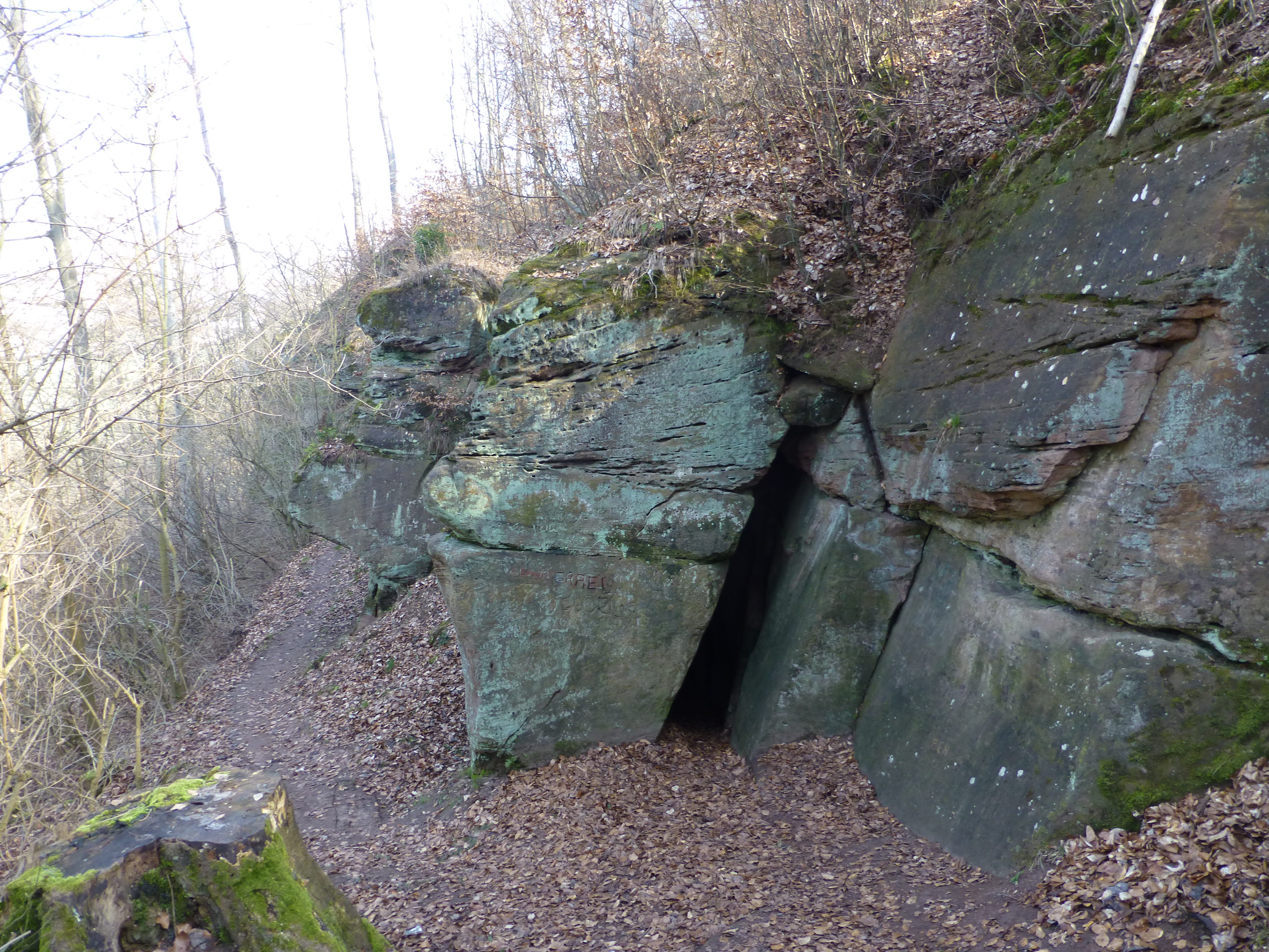 Eingang zur Zwergenhöhle bei Heiligenstadt